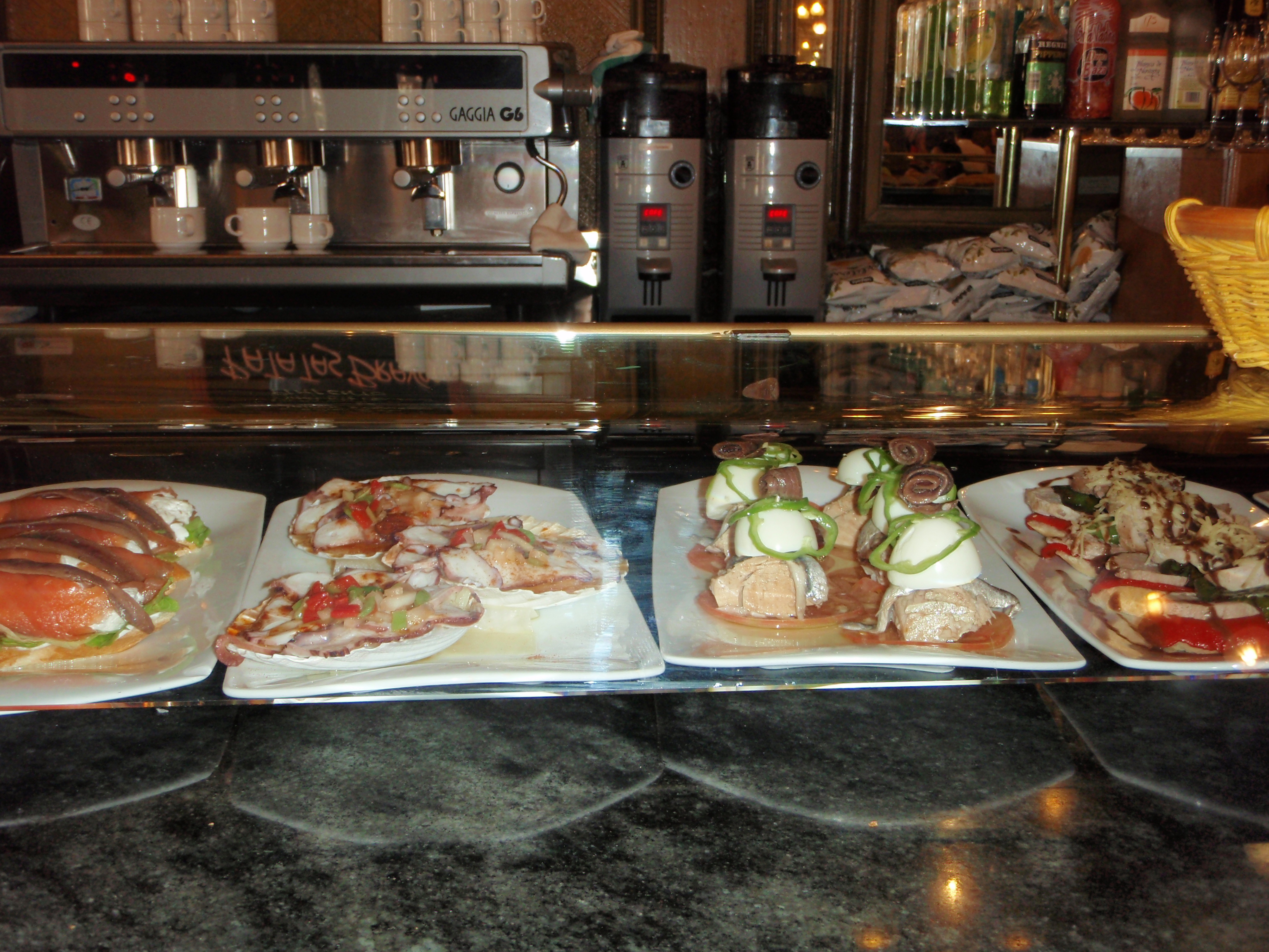 Selezione di pinchos